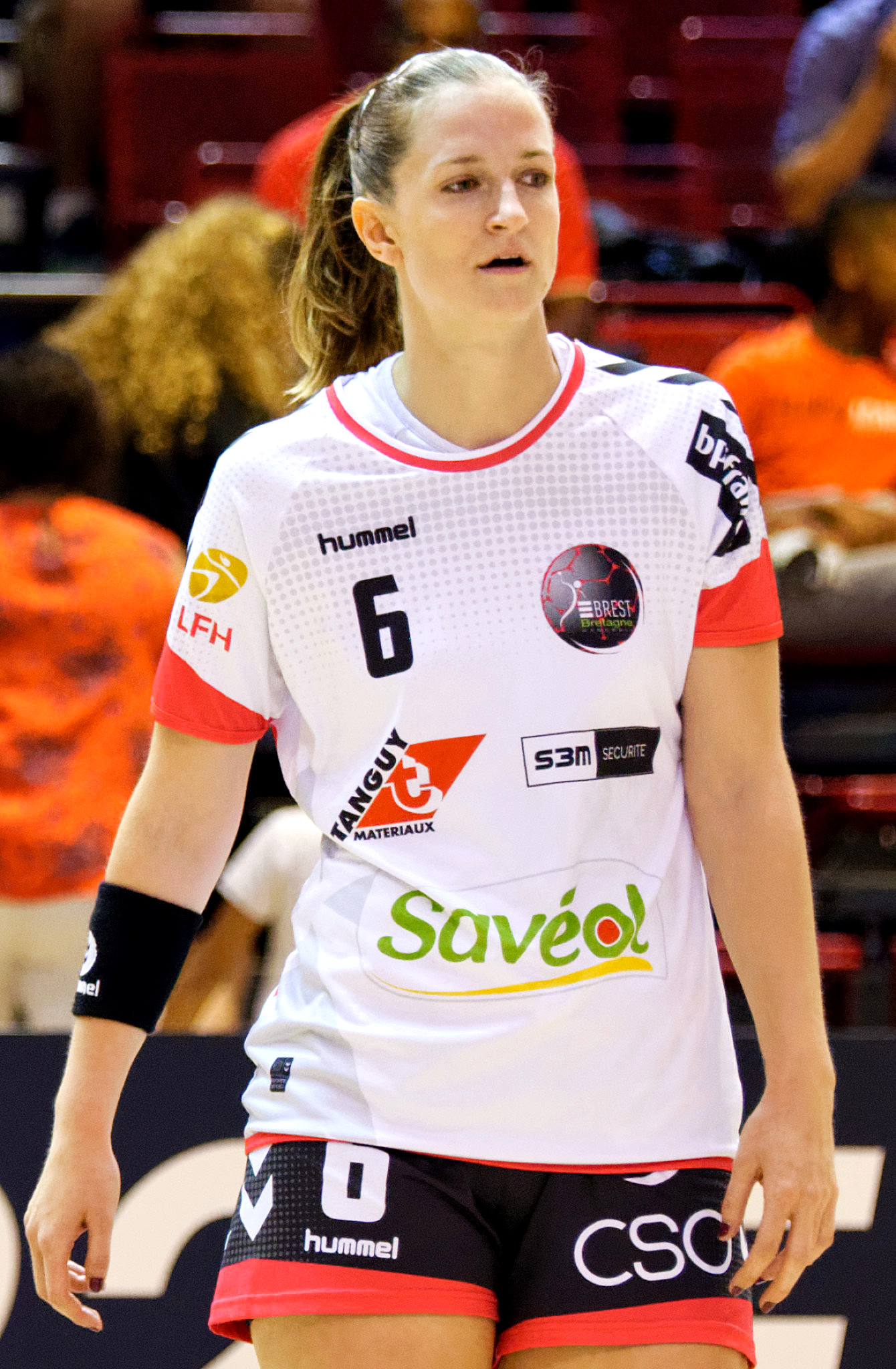 Rencontre de LFH entre Paris 92 et Brest Bretagne Handball. A la Halle Carpentier (Paris), le 05 septembre 2018.